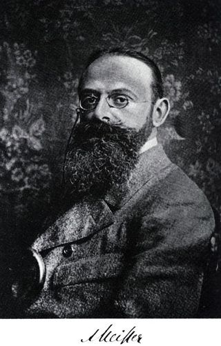 Fotografie von Albert Neisser